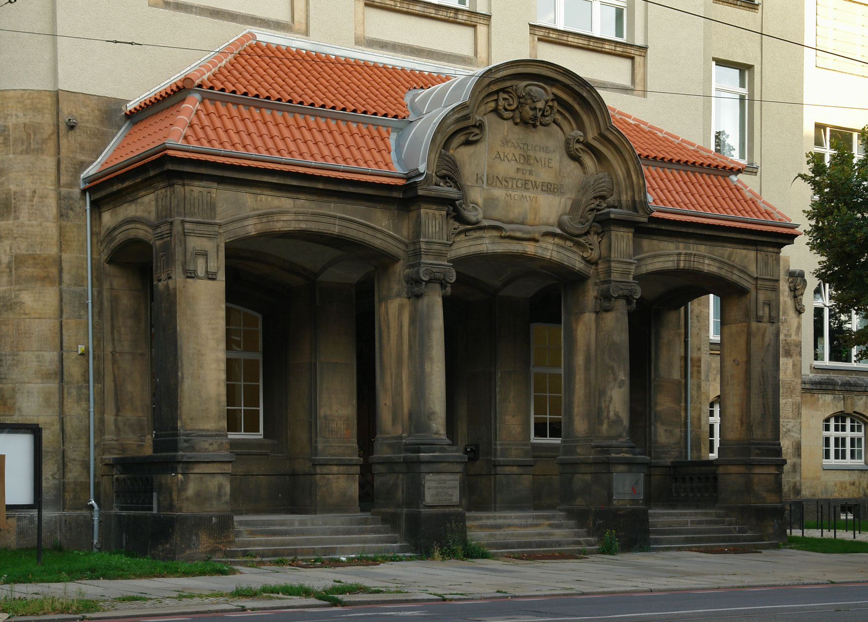 Kunstgewerbeakademie Dresden